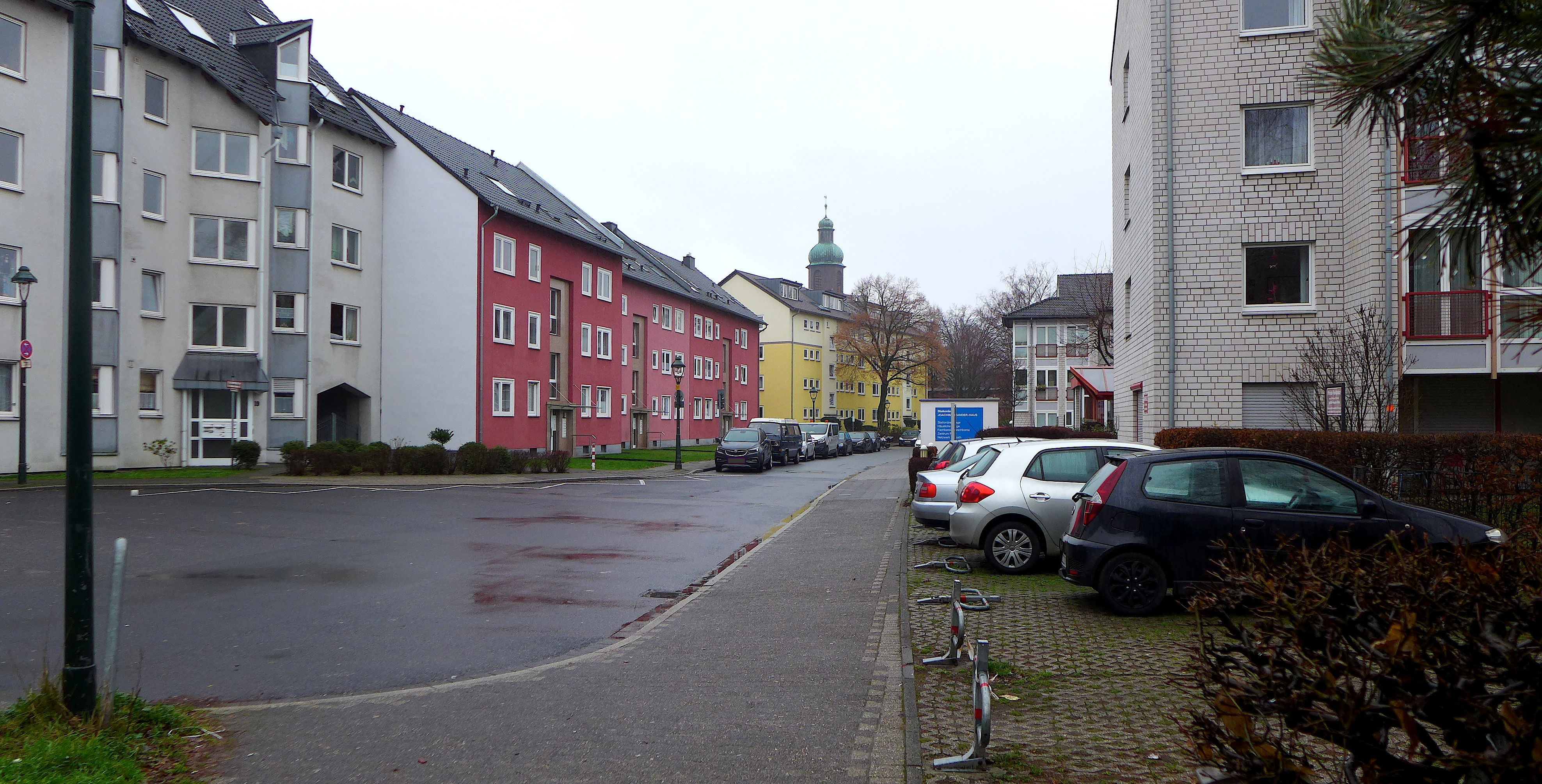 Улица Кальвина в Бенрате (Дюссельдорф).